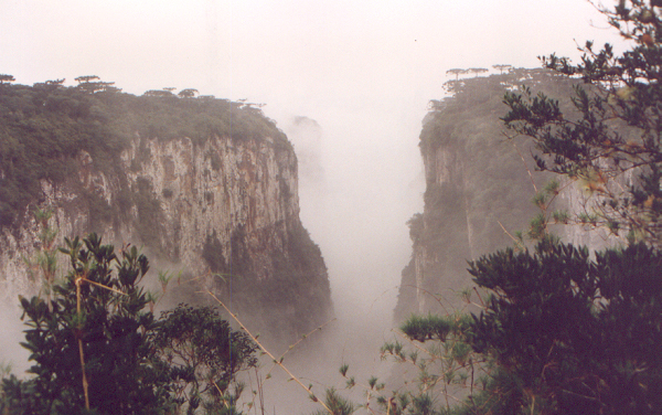 Itaimbezinho Canyon, at Aparados da Serra,Rio Grande do Sul, Brazil